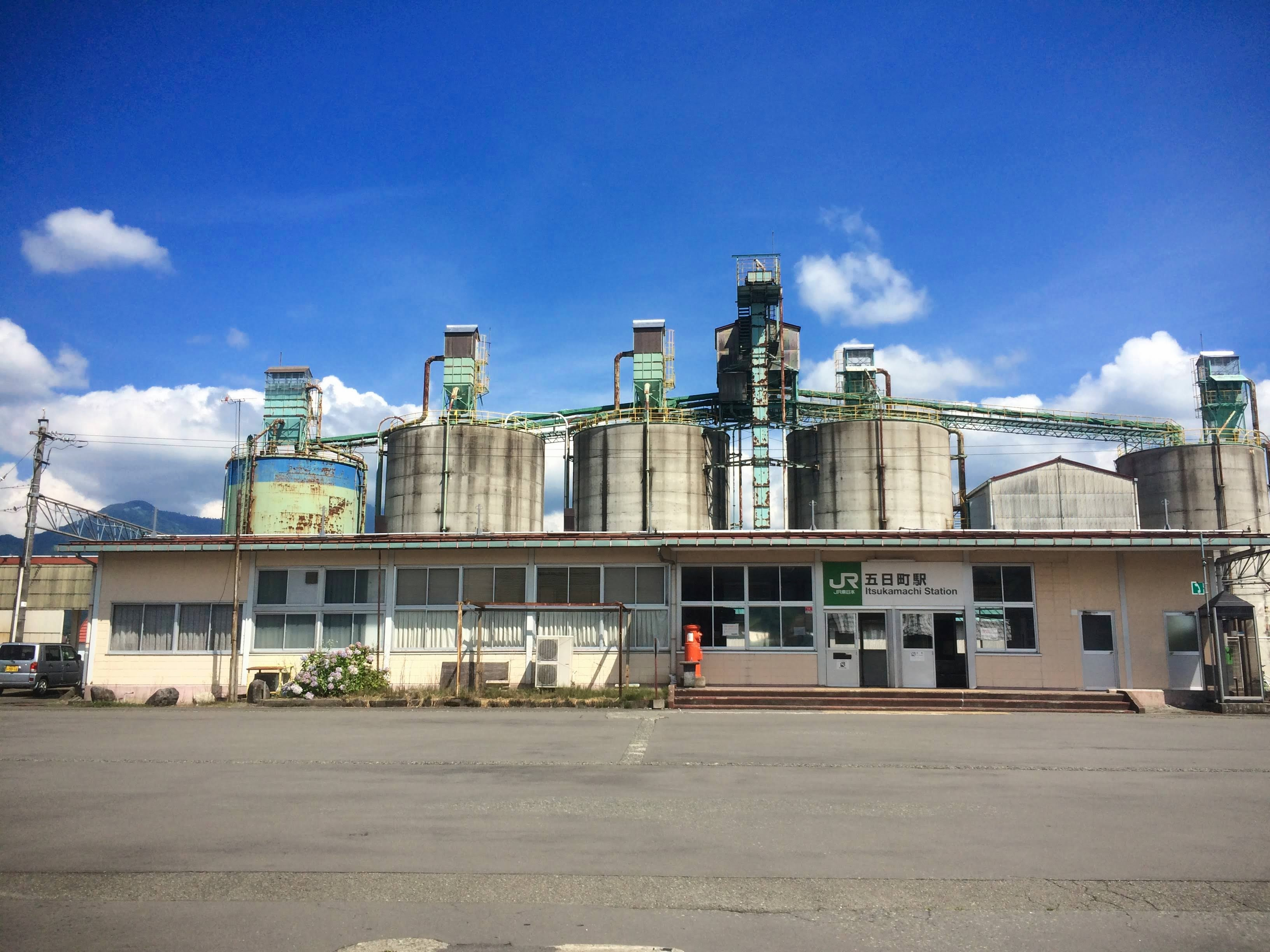 五日町駅の駅舎